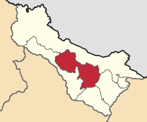 Mapa localizacor del cantón Bolívar, Carchi, Ecuador